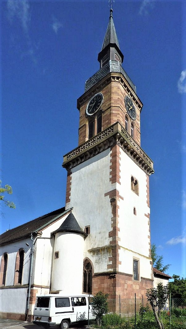 Église Saint Barthélémy (Gertwiller)